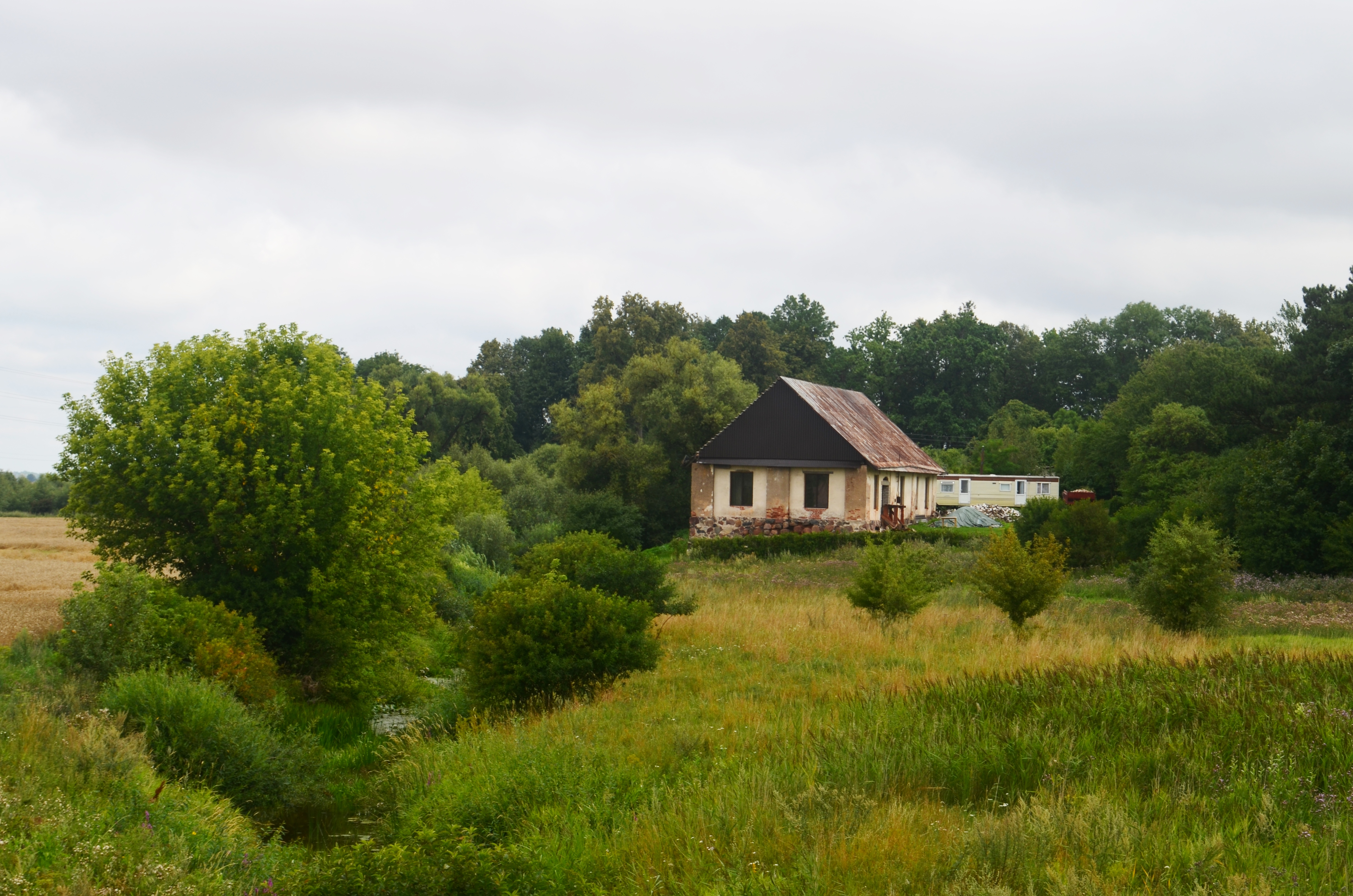 Palankesiai, Jonavos raj.